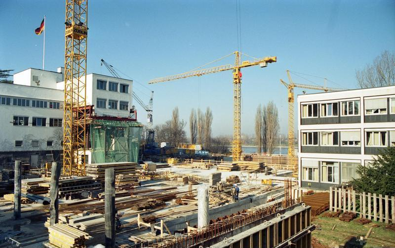 9.2.1989 Bauarbeiten im Regierunsviertel: Bundeshaus, Bereich Plenarsaal und Präsidialflügel.